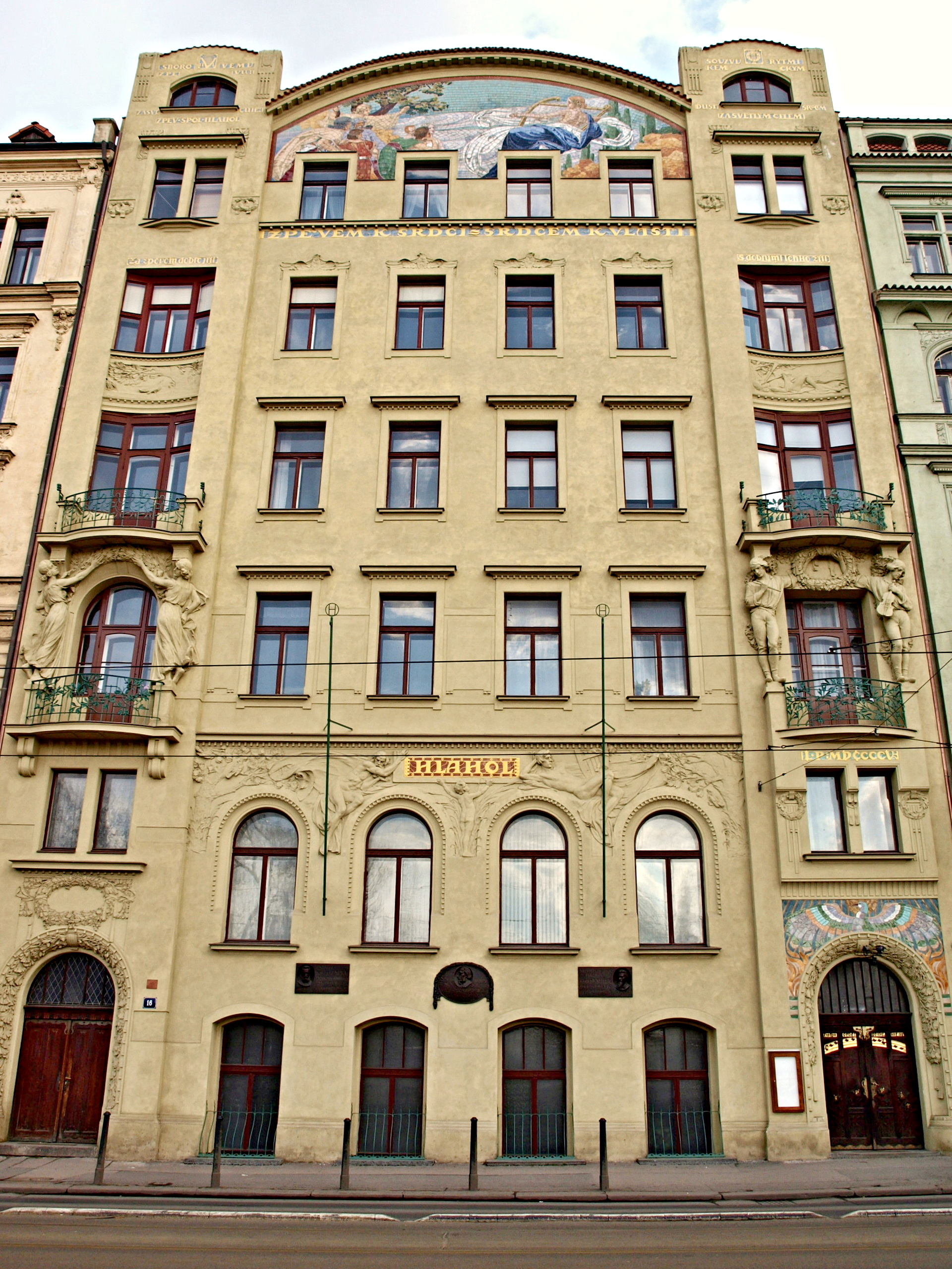 Hlahol